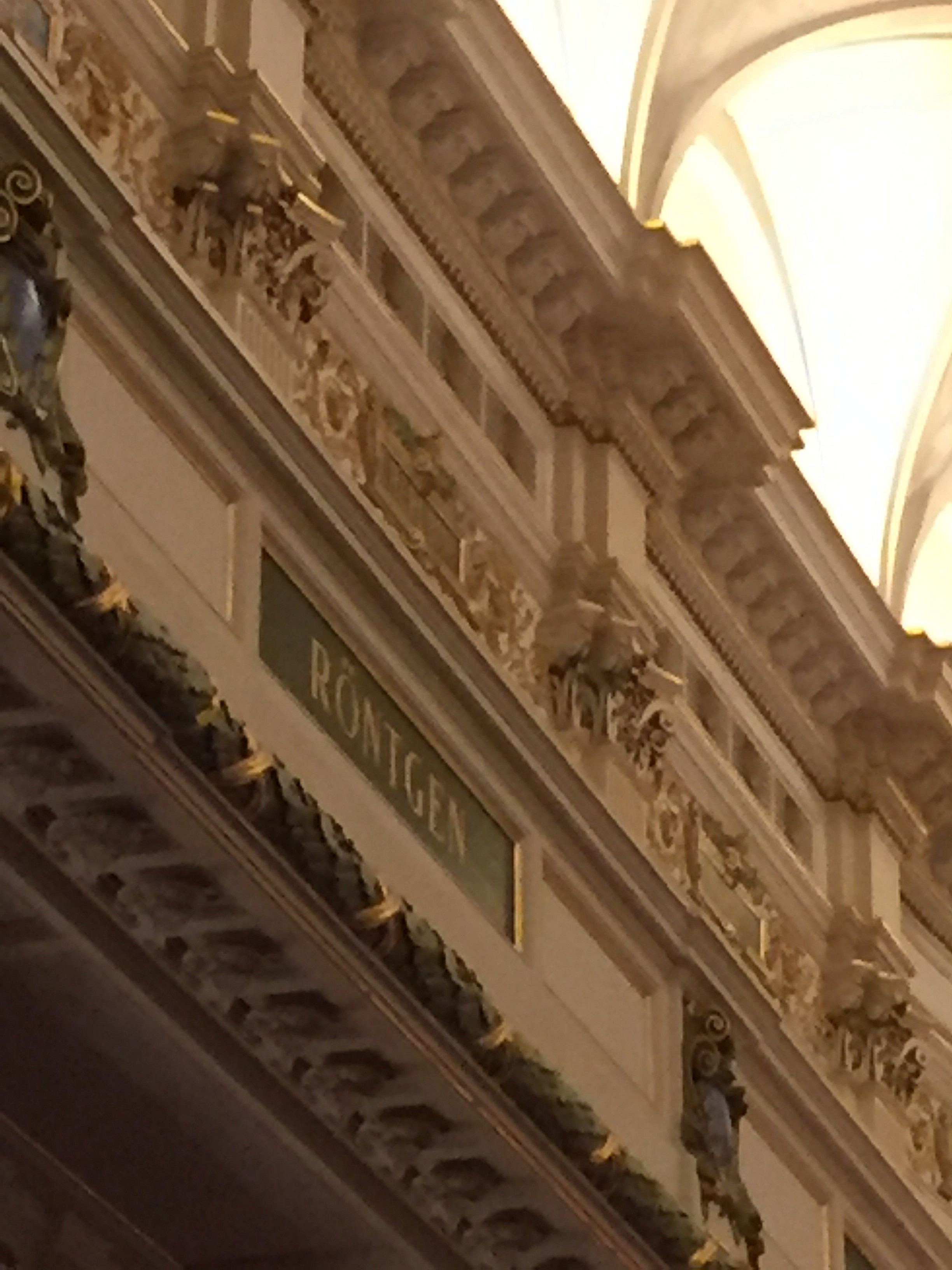 Het bordje van de componist Röntgen in het Concertgebouw. Het zit op het balkon links in de zaal, tussen Bartók en Rich. Strauss